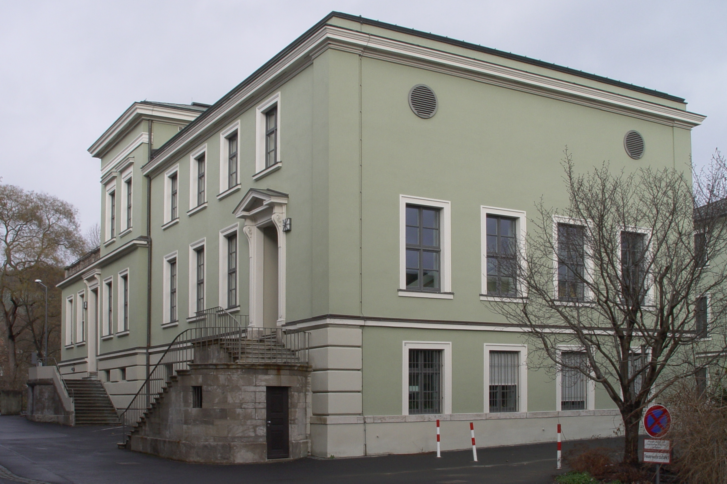 Ehemaliges Institut für Physik, Universität Würzburg, Röntgenring 8. - Südwest-Ansicht (Gebäuderückseite This is a photograph of an architectural monument.